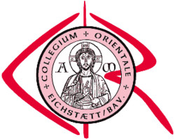 Collegium Orientale des Bistums Eichstätt (Bayern)